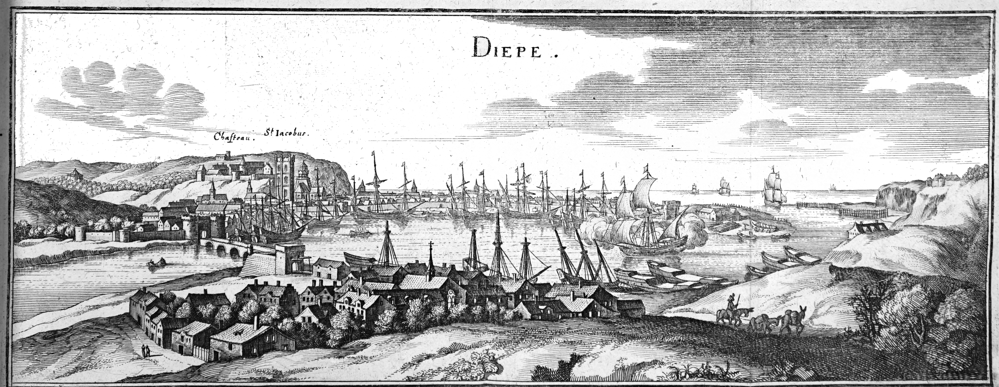 dessin provenant de "Topographiae Galliae".